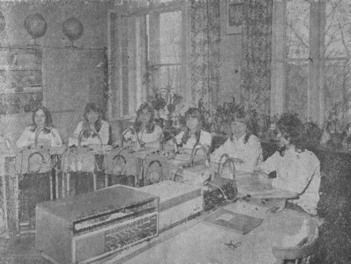 OSW Poznań, lekcja geografii kl. VIII rok 1980